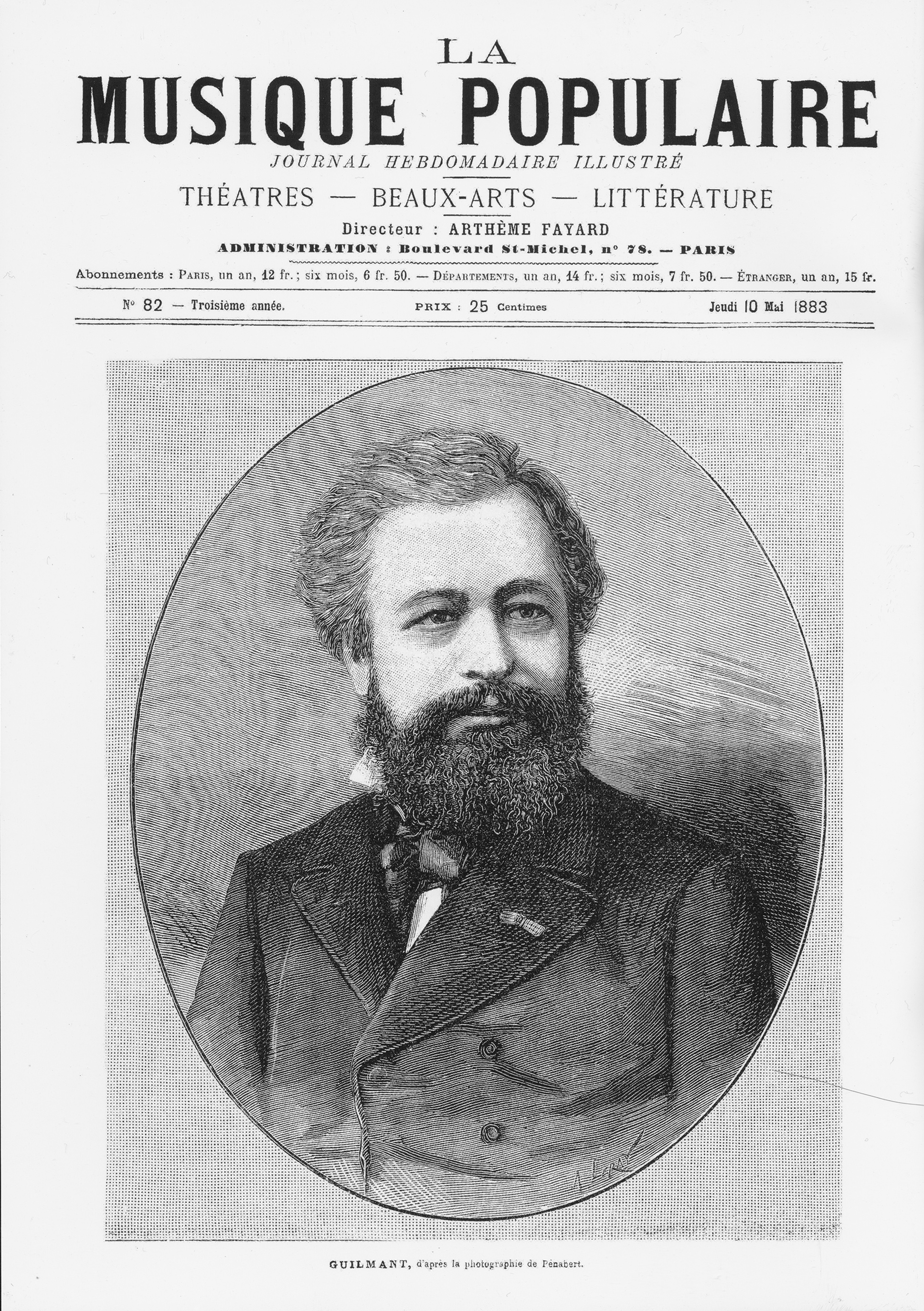 Alexandre Guilmant en première page de "La musique populaire".